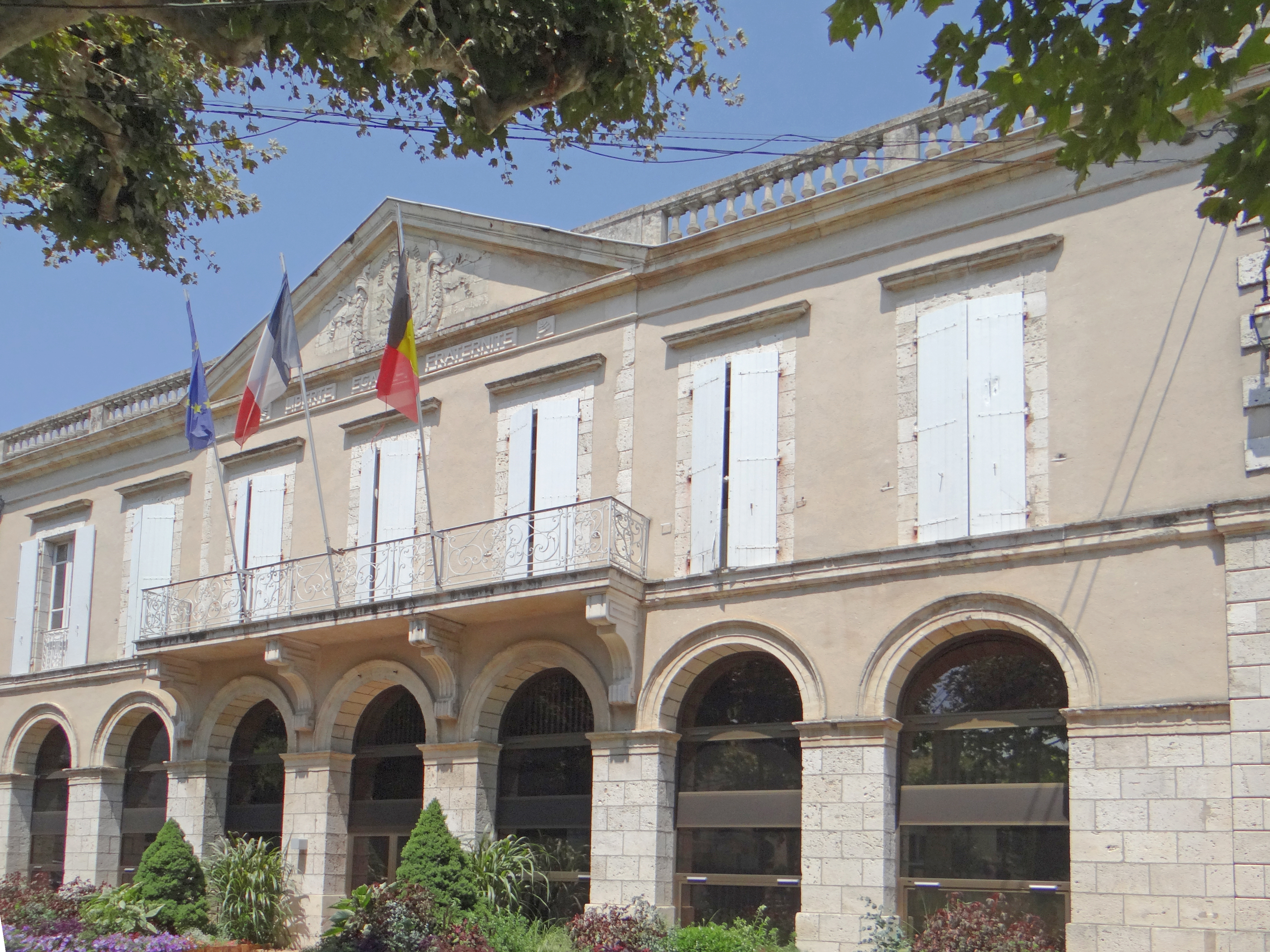 Aiguillon - Hôtel de ville